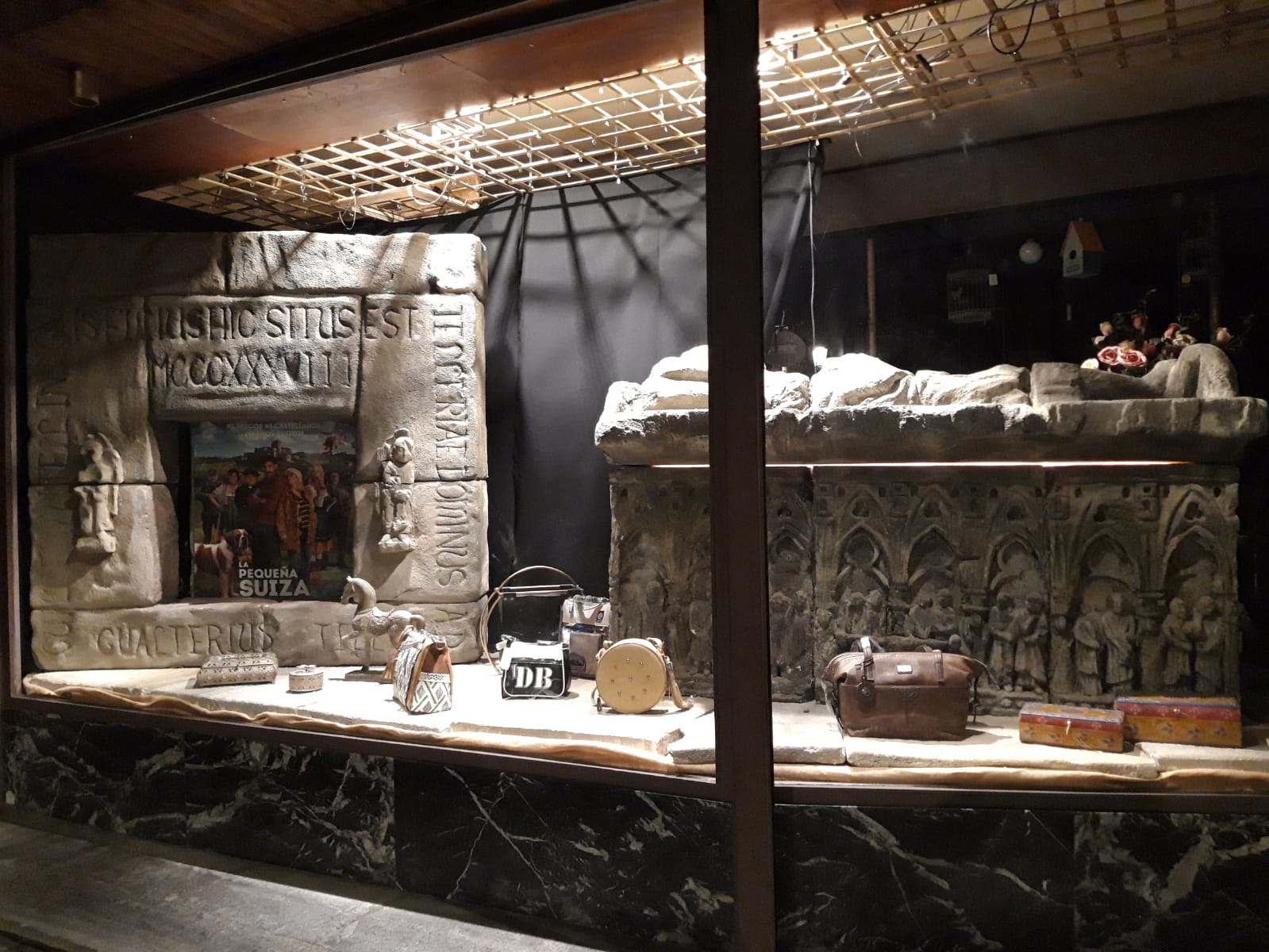 La Pequeña Suiza filmeko attrezzoa erakusgai